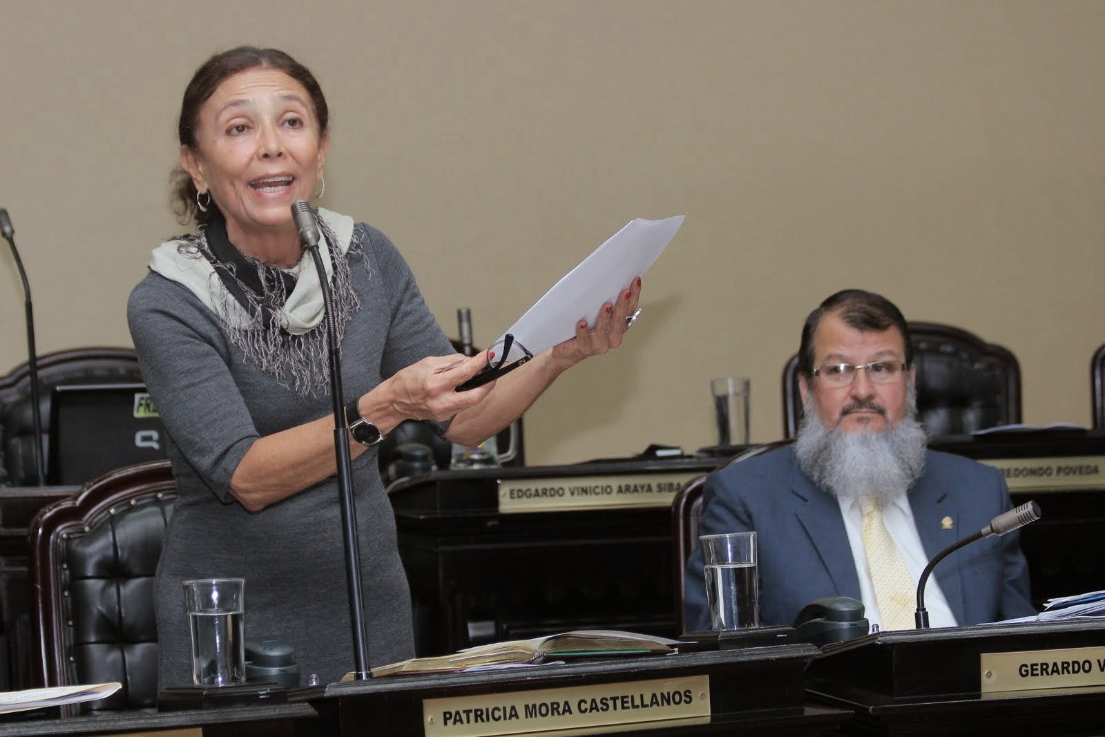 Diputado del 2014-2018 por el Frente Amplio